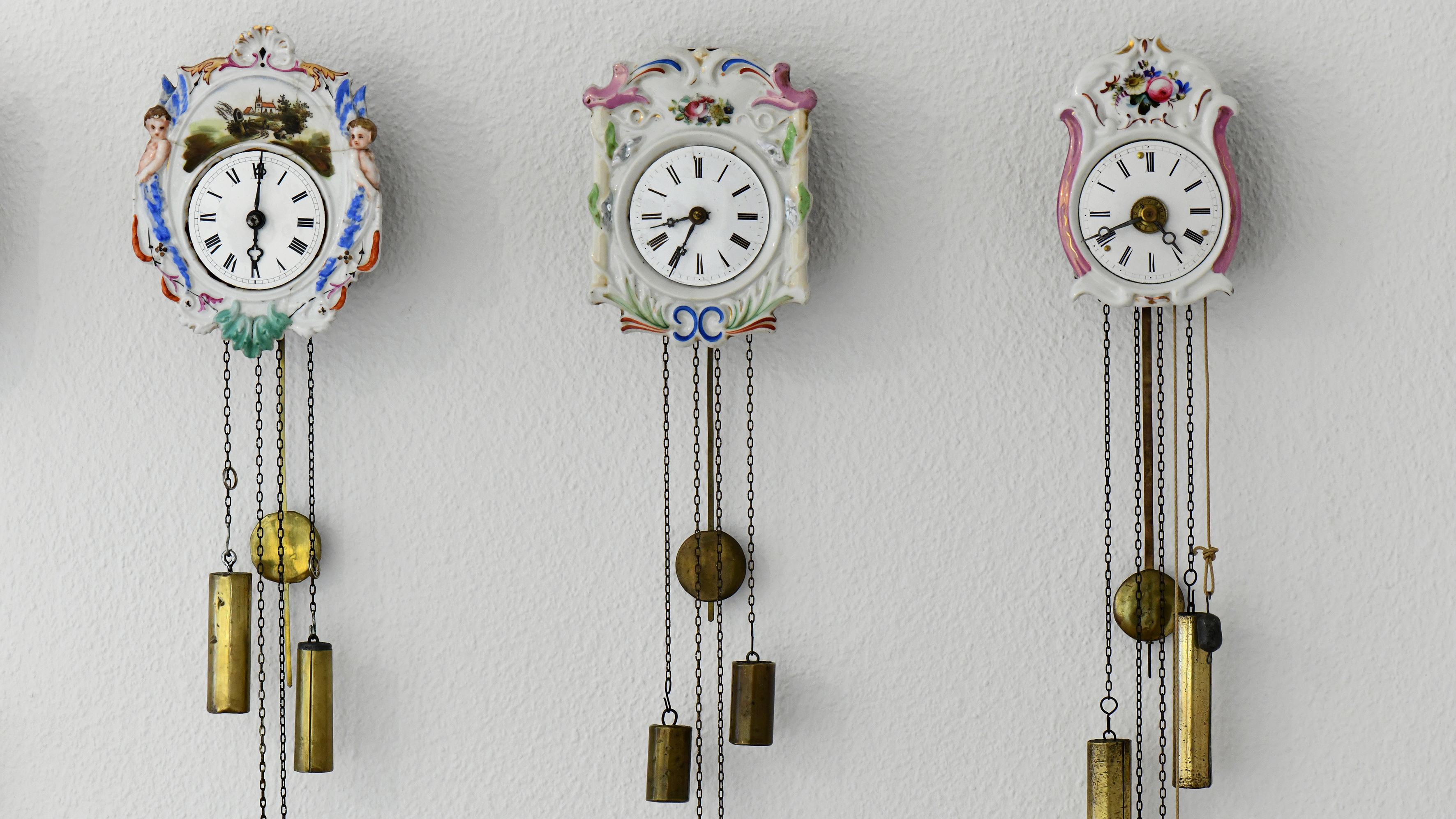 Schwarzwälder-Uhrwerk (Schottenwerk), Halbstundenschlag, Ankerhemmung und Schlossscheiben-Schlagwerk, ca. 1860.